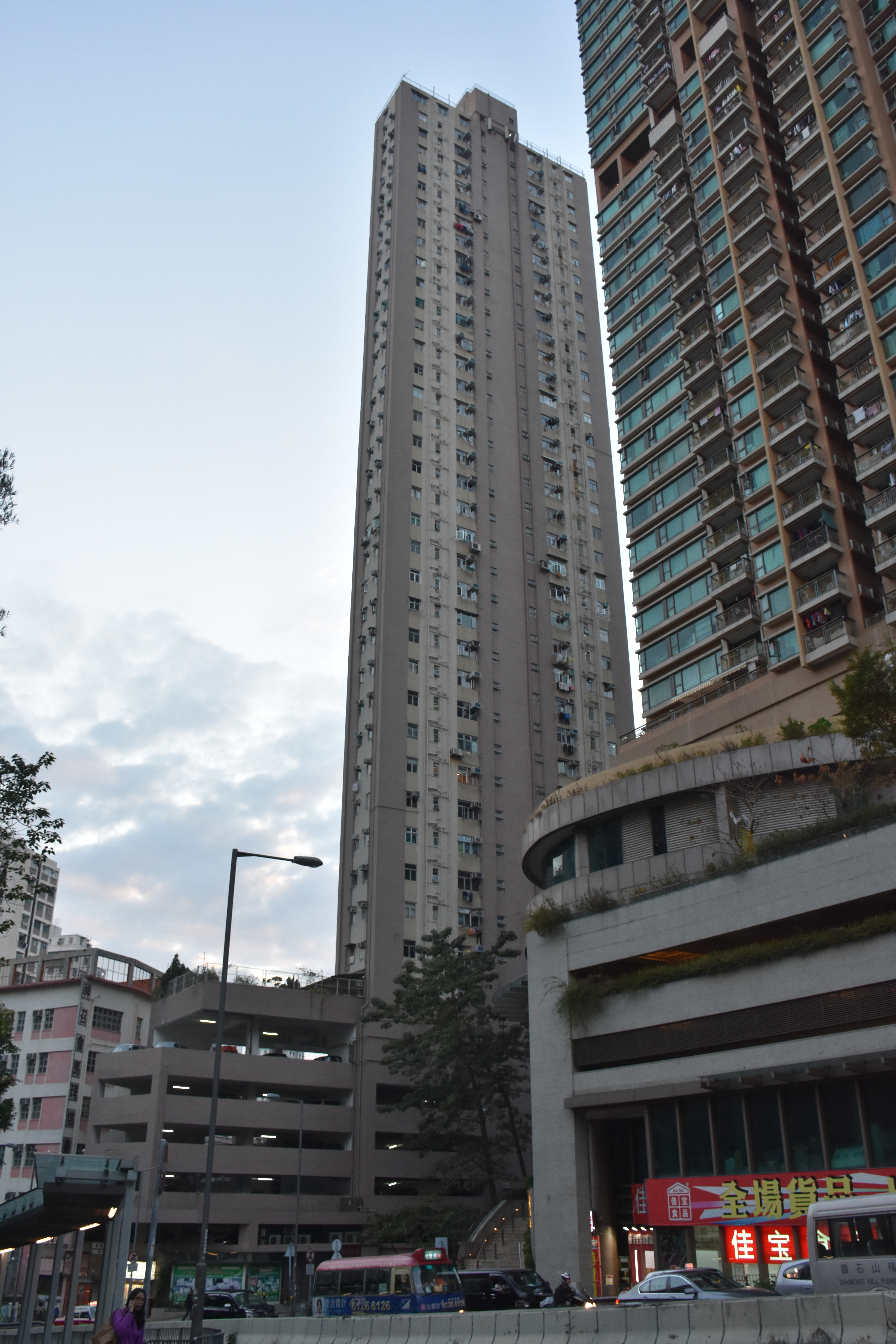 中文（香港）: 秀芳花園背面。